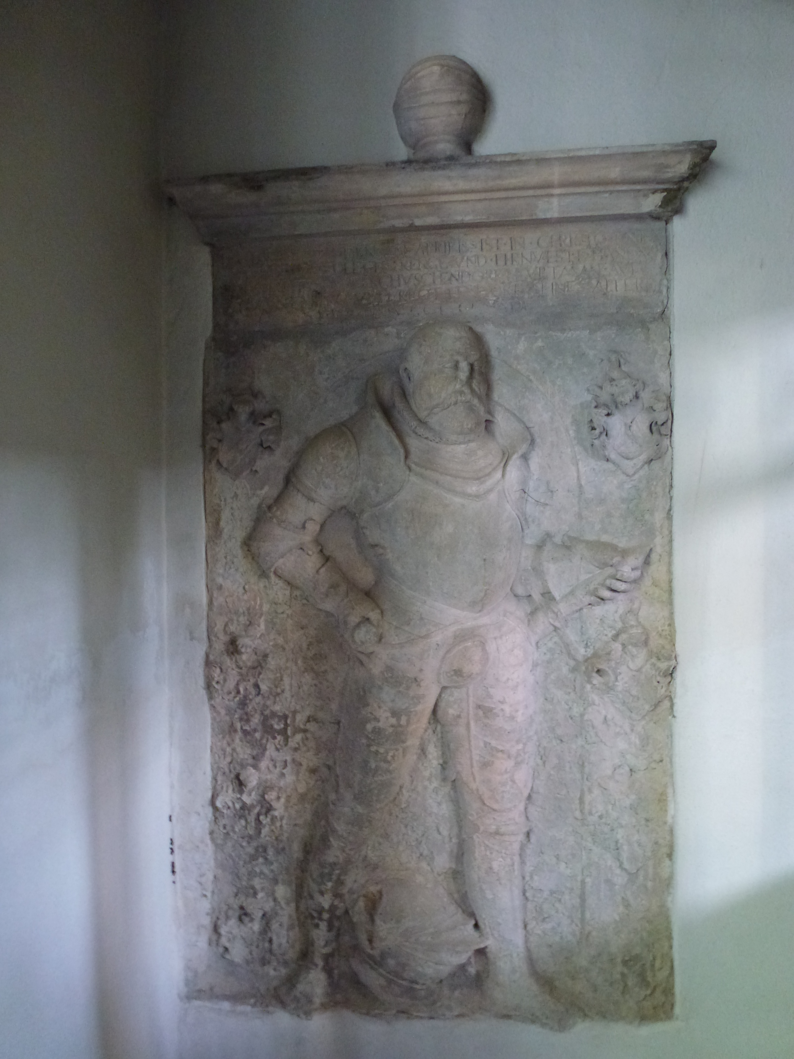 Hans von Carlowitz, Marienkirche Dohna